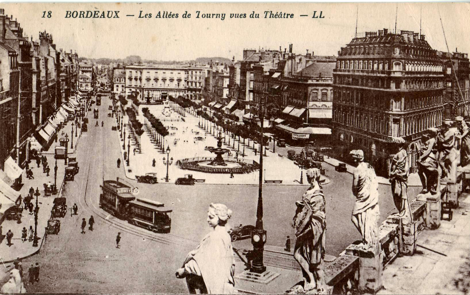 Carte postale ancienne éditée par LL, n°18 :BORDEAUX - Les Allées de Tourny, vues du Théâtre